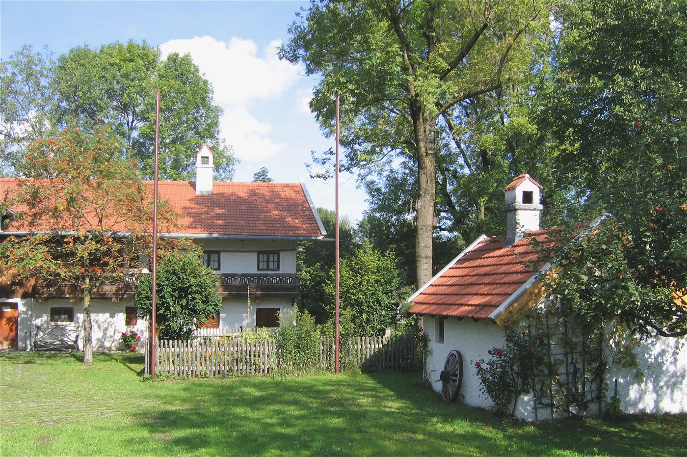 Wolfschneiderhof, Heimatmuseum in Taufkirchen bei München